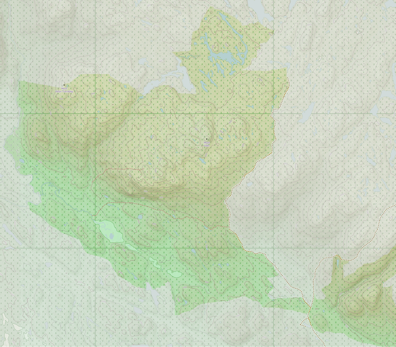 Carte du parc national des Monts-Valins, Québec